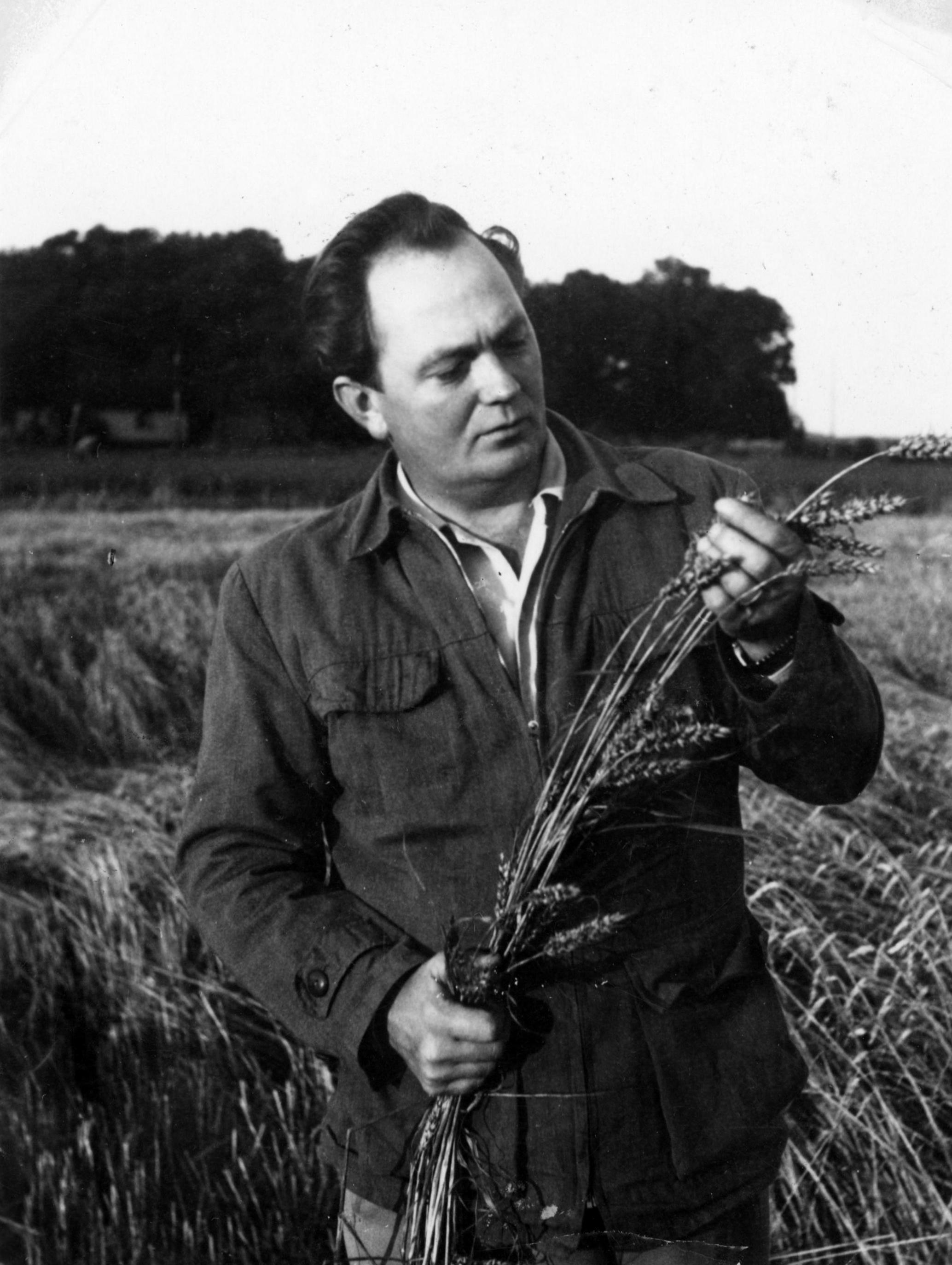 Johannes Antonsson - Landsbygd 1940 tal